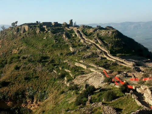 Resti del castello di Occhiolà